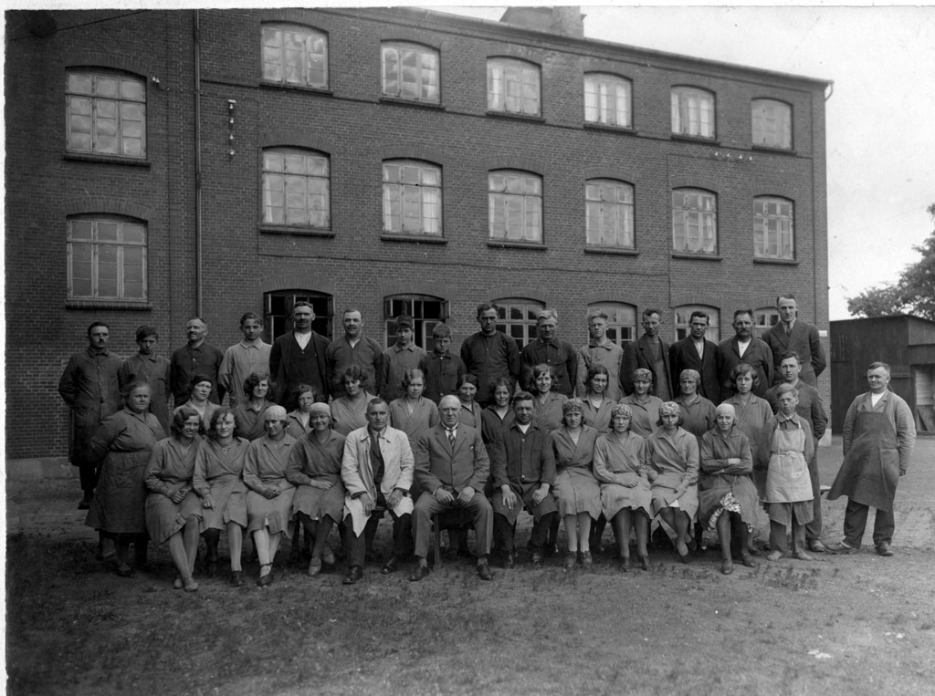 Kaffesurrogatfabriken Danmark A/S in Hedehusene, Denmark